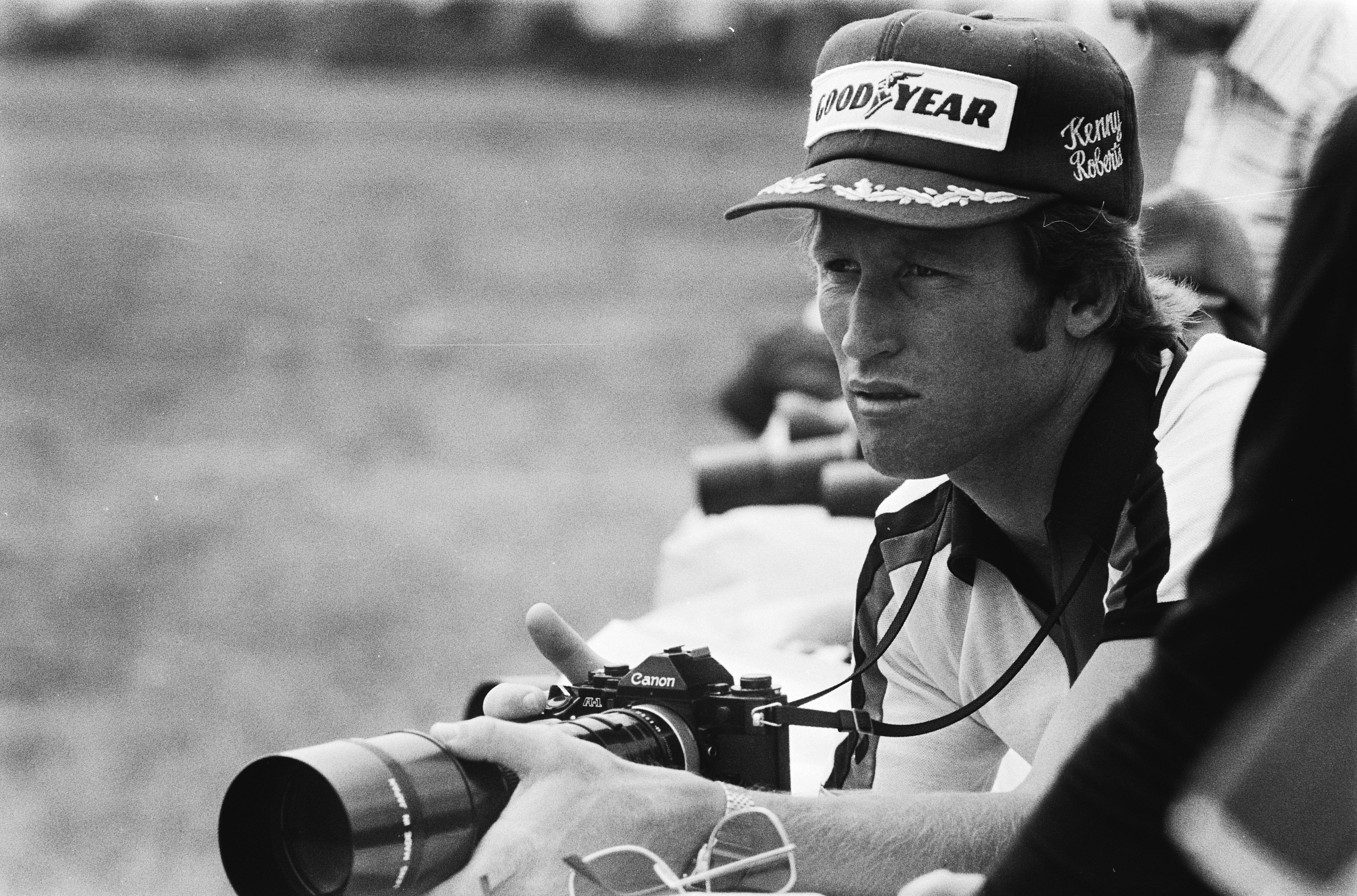 Collectie / Archief : Fotocollectie Anefo Reportage / Serie : TT Assen 1979 Beschrijving : TT Assen. Wereldkampioen Kenny Roberts fotografeert de 250cc Datum : 23 juni 1979 Locatie : Assen, Drenthe Trefwoorden : fotografen, motorcoureurs, motorsport Persoonsnaam : Roberts, Kenny Fotograaf : Bogaerts, Rob / Anefo Auteursrechthebbende : Nationaal Archief Materiaalsoort : Negatief (zwart/wit) Nummer archiefinventaris : bekijk toegang 2.24.01.05 Bestanddeelnummer : 930-3293